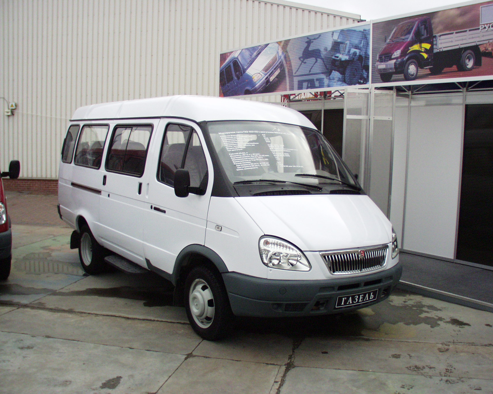 Gazela GAZ-322132 z silnikiem IVECO